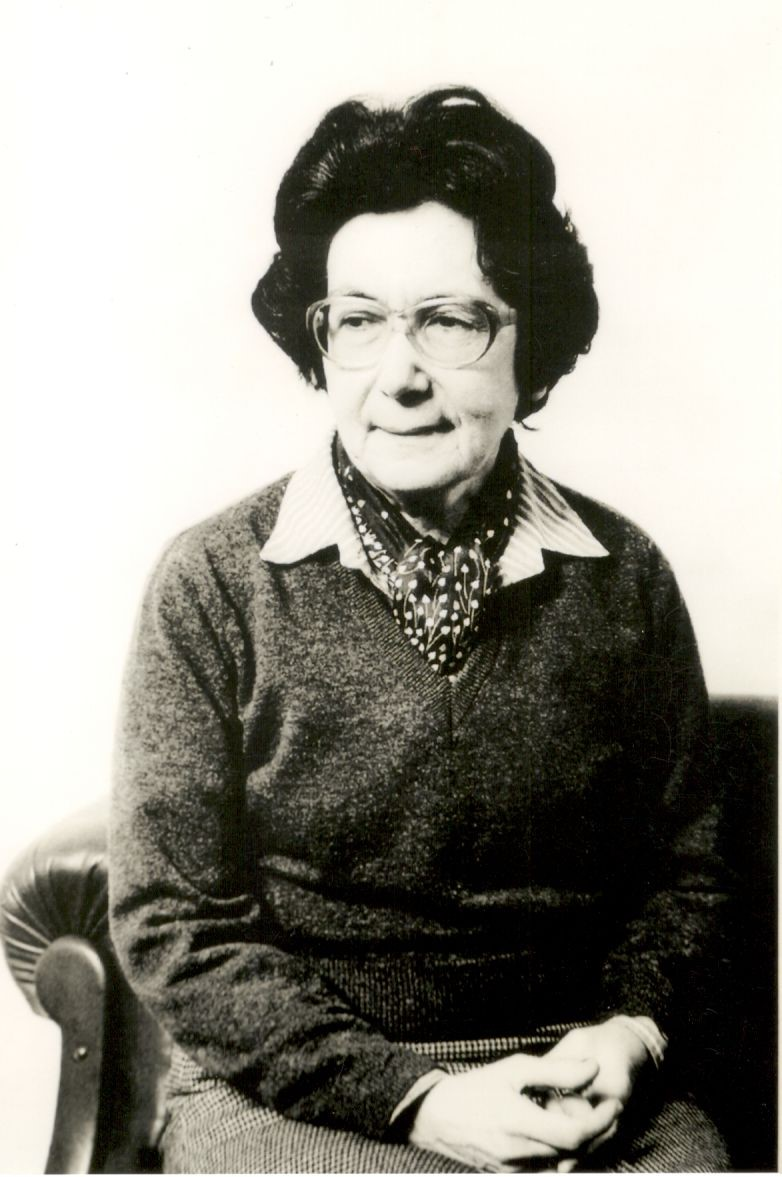 Фотографија направена во Битола